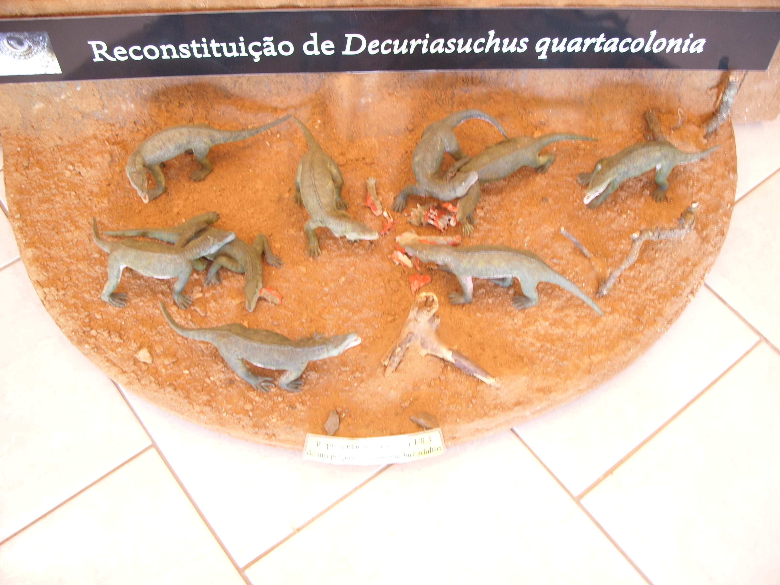 Grupo de Decuriasuchus no Museu de Ciências Naturais da Fundação Zoobotânica do Rio Grande do Sul (Paleorro)